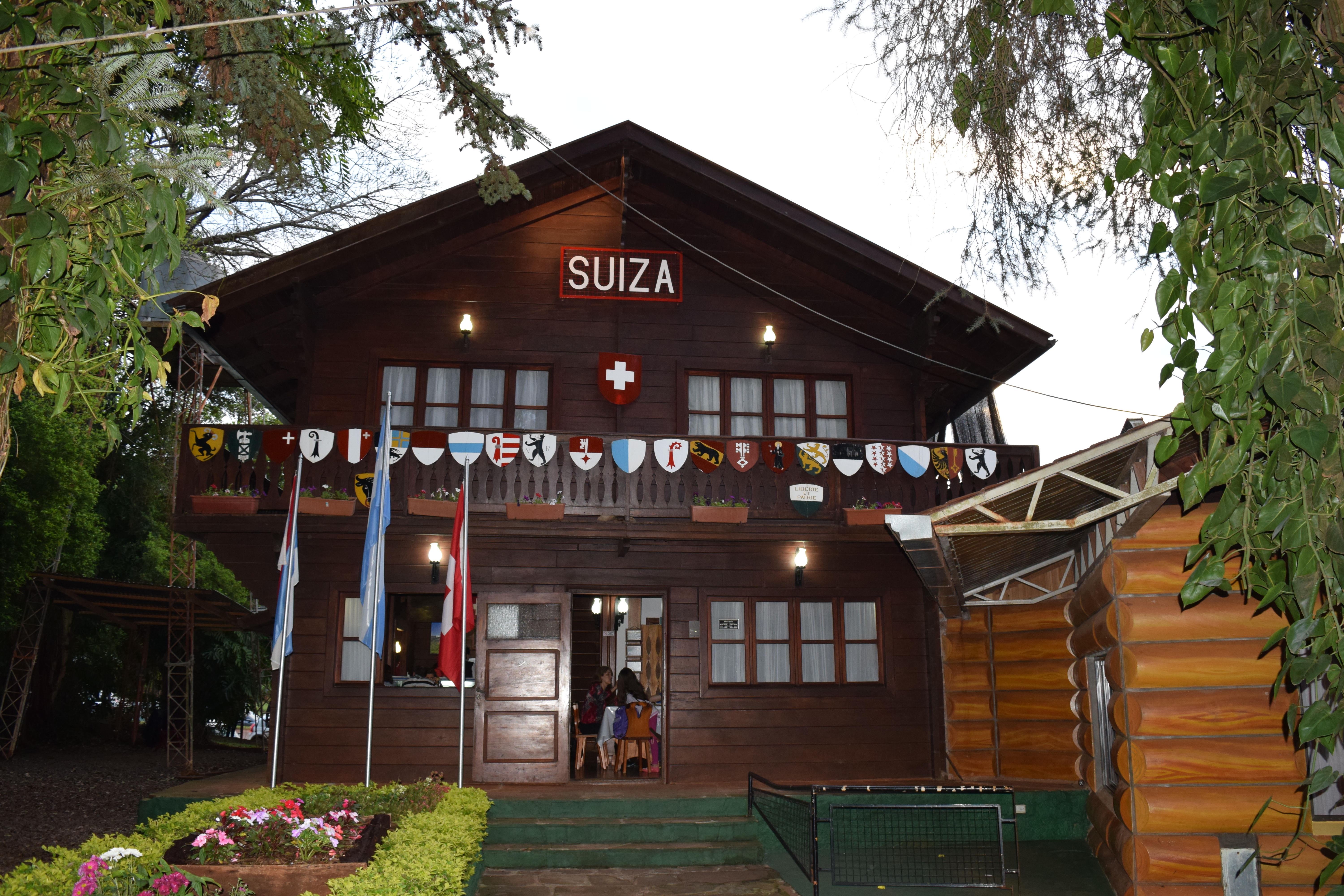 Casa típica de la colectividad suiza en la Fiesta Nacional del Inmigrante en Oberá, Misiones, Argentina.